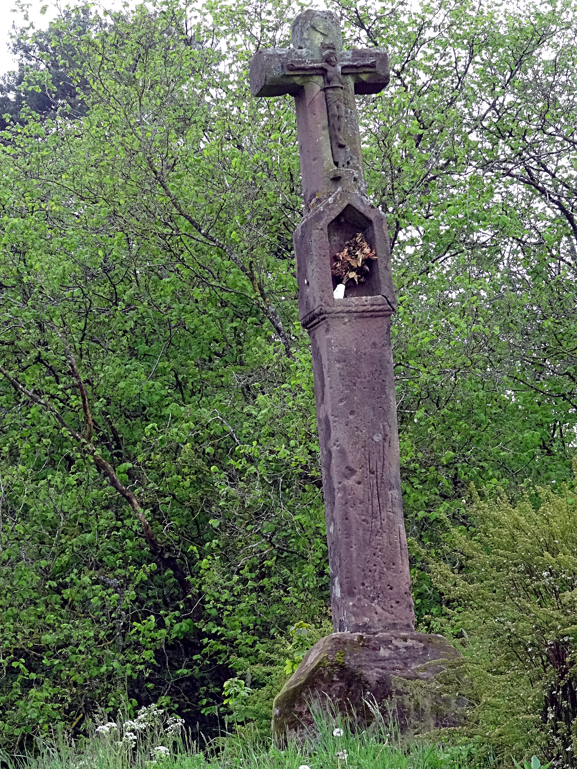 historisches Ablasskreuz in Berndorf (Eifel)